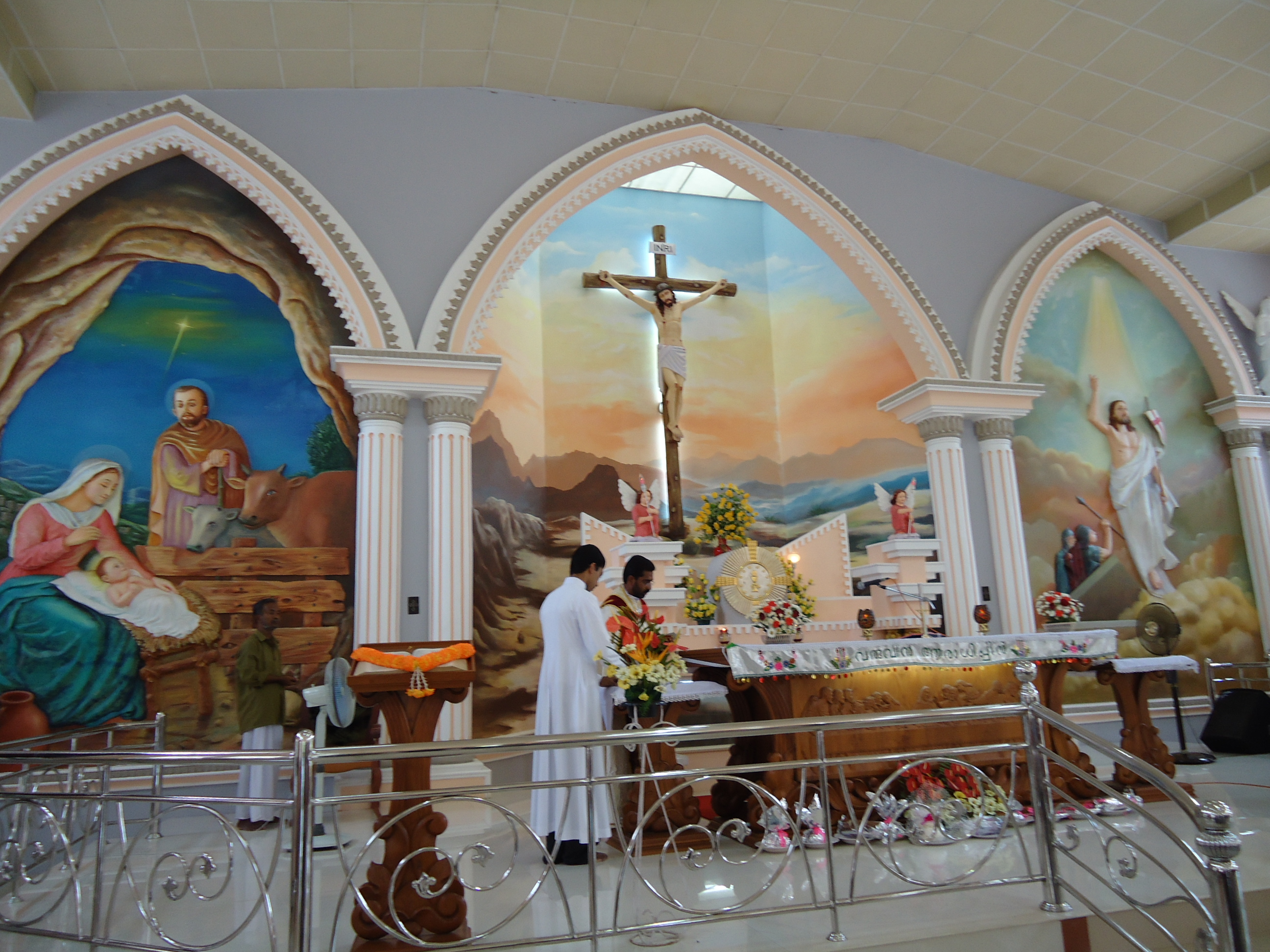 Church altar kerala